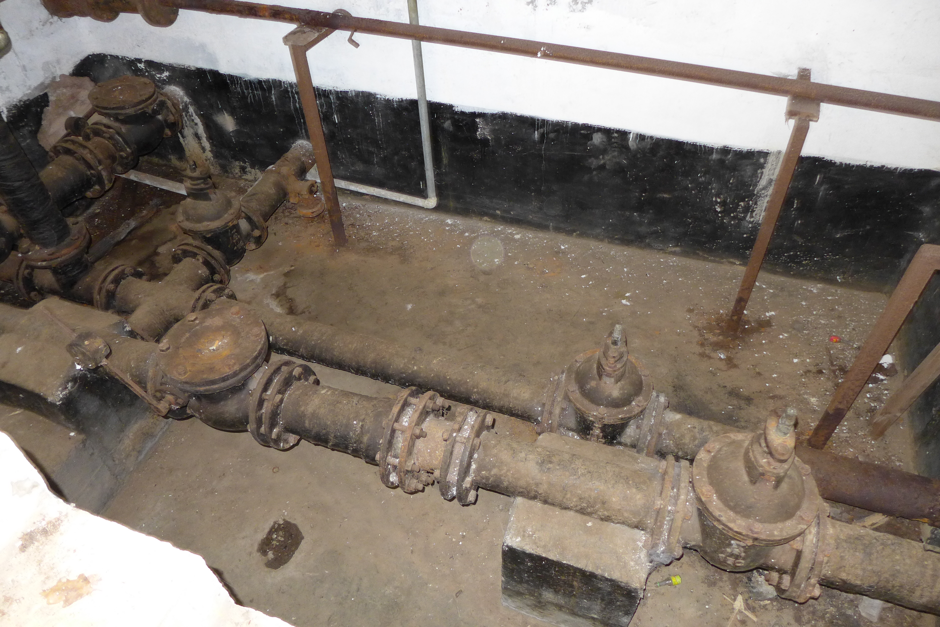 Wallerfangen, Ehemaliger Trinkwasserhochbehälter Niederlimberg